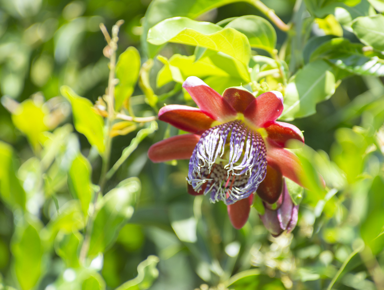 Flor de Mbaracuya